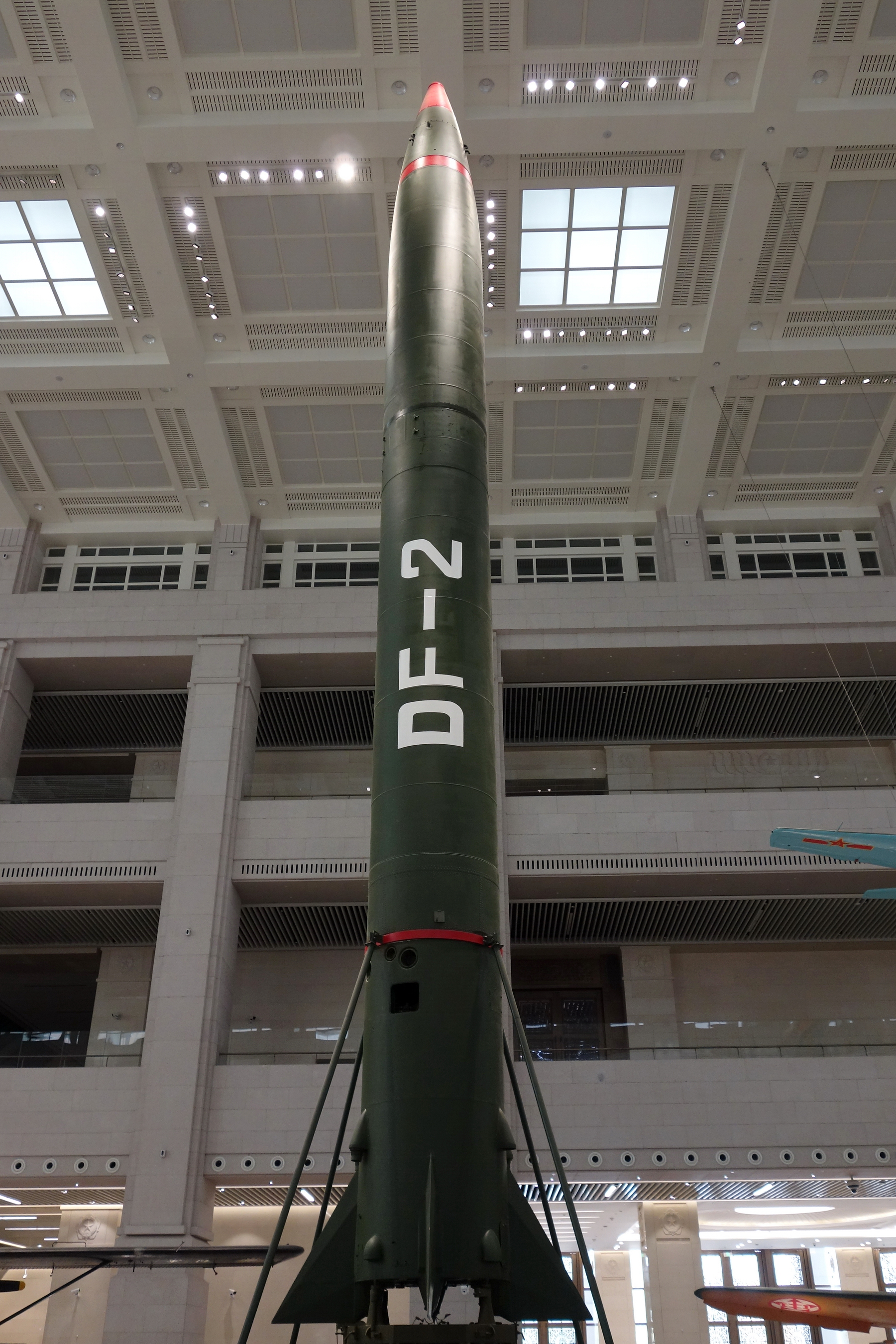 在中国人民革命军事博物馆展出的“东风二号”地地导弹。